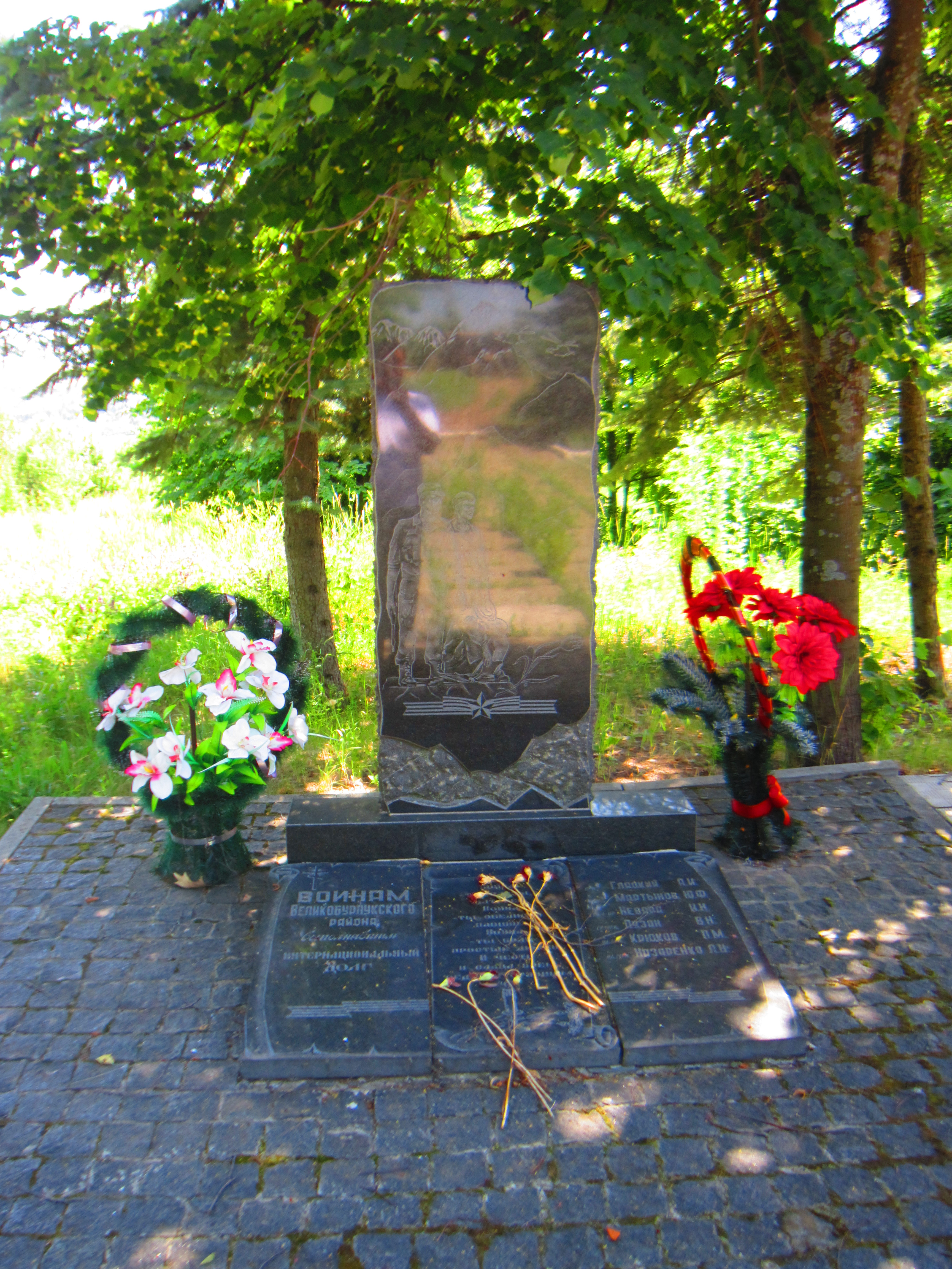 Вікіекспедиція до Великобурлуцької громади. Великий Бурлук, 15 червня 2019 року.Пам'ятний знак воїнам-інтернаціоналістам на Меморіальному комплексі Слави, розташоване біля Центрального кладовища, на Осіянській горі.